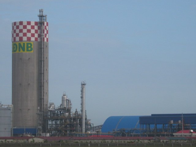 Công trình Nhà máy đạm Ninh Bình - Khu công nghiệp Khánh Phú, Ninh Bình